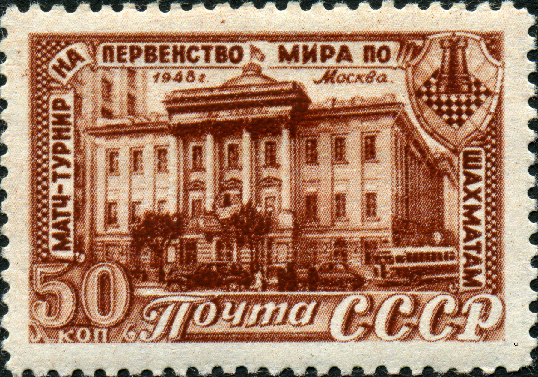 Марка СССР